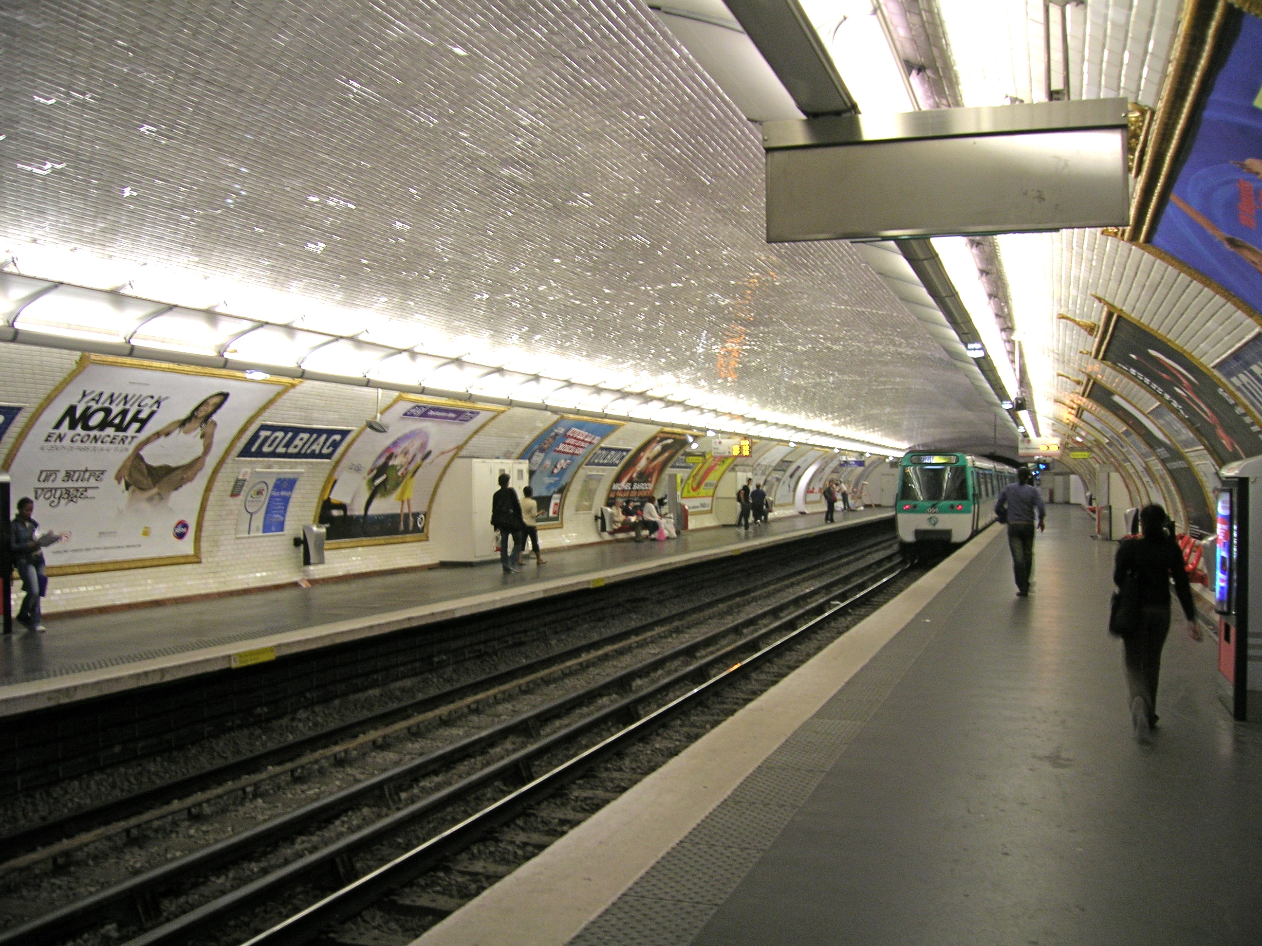 Quais de la station de métro Tolbiac, ligne 7, Paris